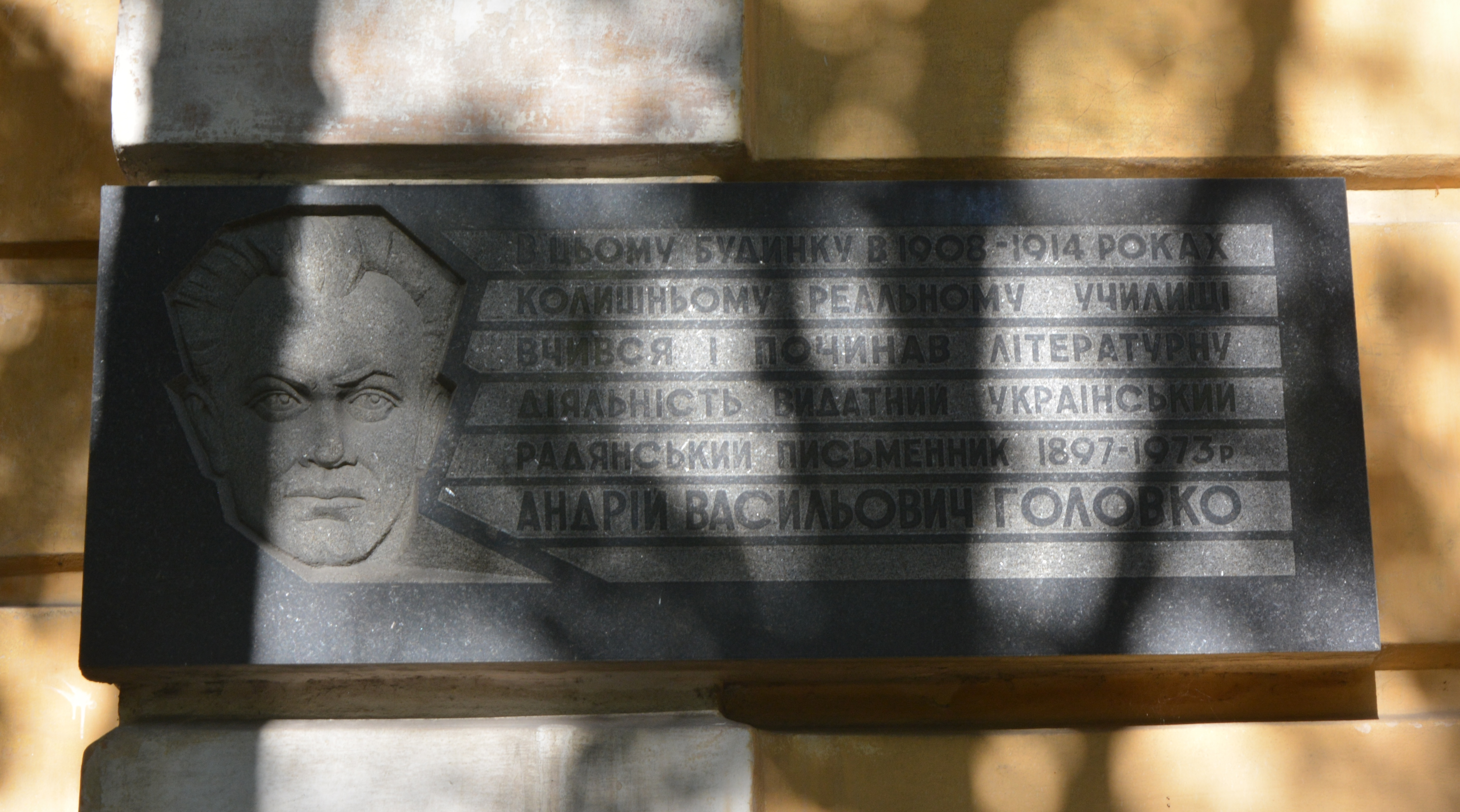 Олександрівське реальне училище (нині 1 корпус Кременчуцького льотного коледжу), у якому у 1908-1914 роках навчався український радянський письменник Андрій Головко, проживав Василь Сухомлинський, Кременчук, Вул. Коцюбинського, 12